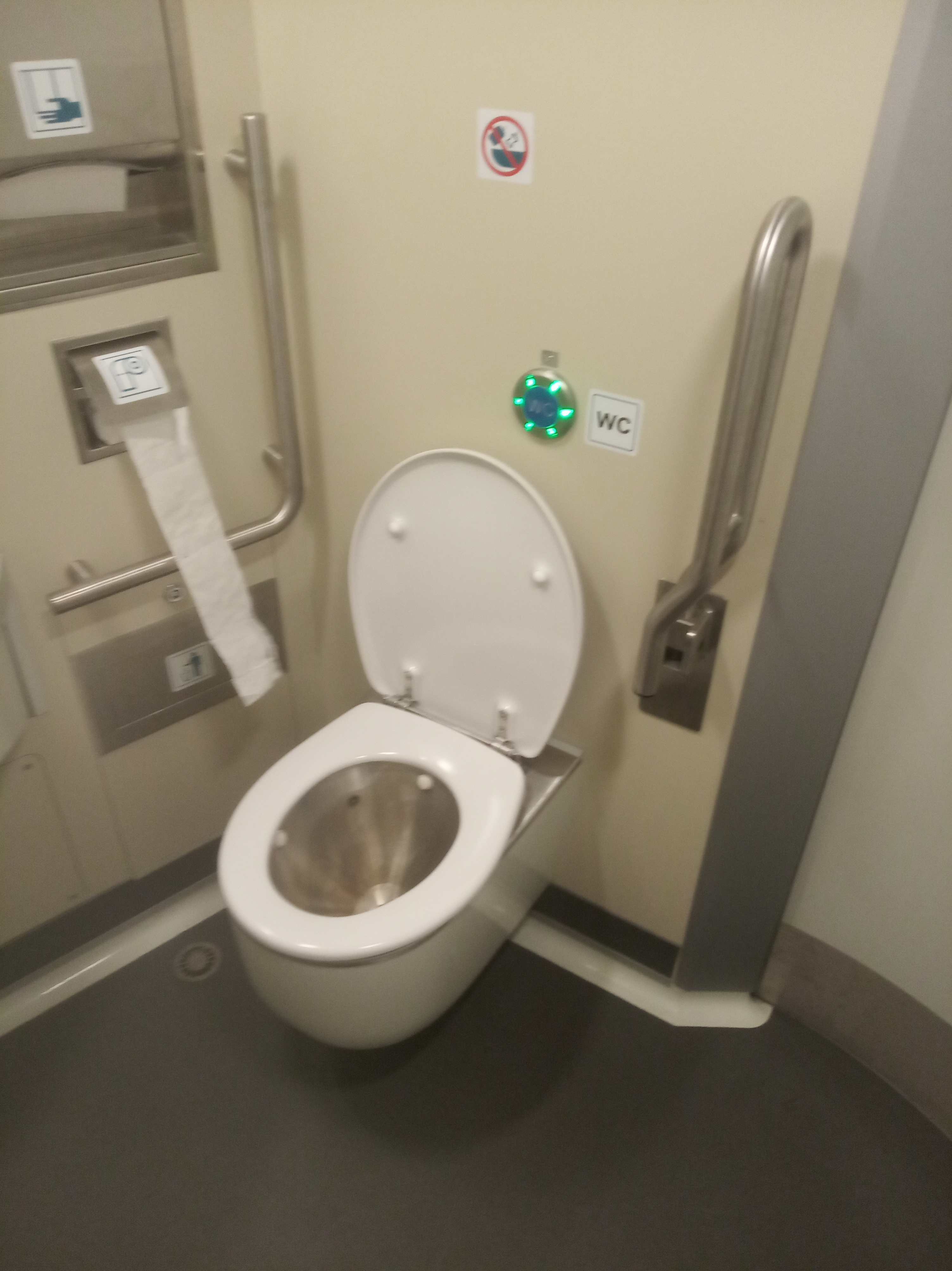 bezbarierová toaleta v jednotce 845.3